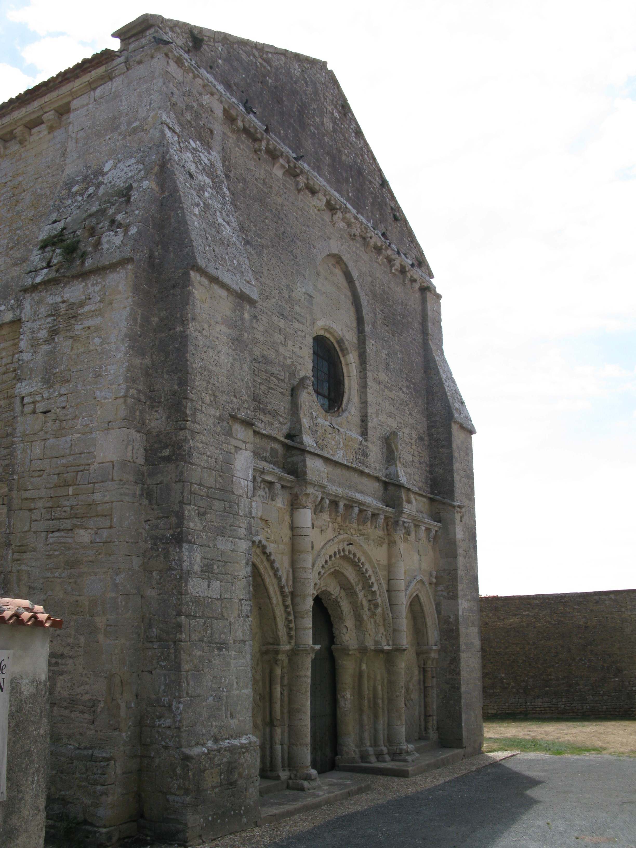 Façade de l'église Saint-Vivien à Vandré.